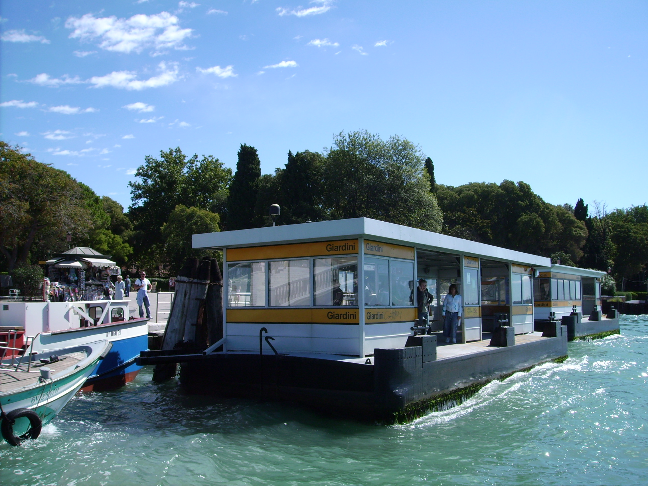 Floating Vaporetto stop in Venezia